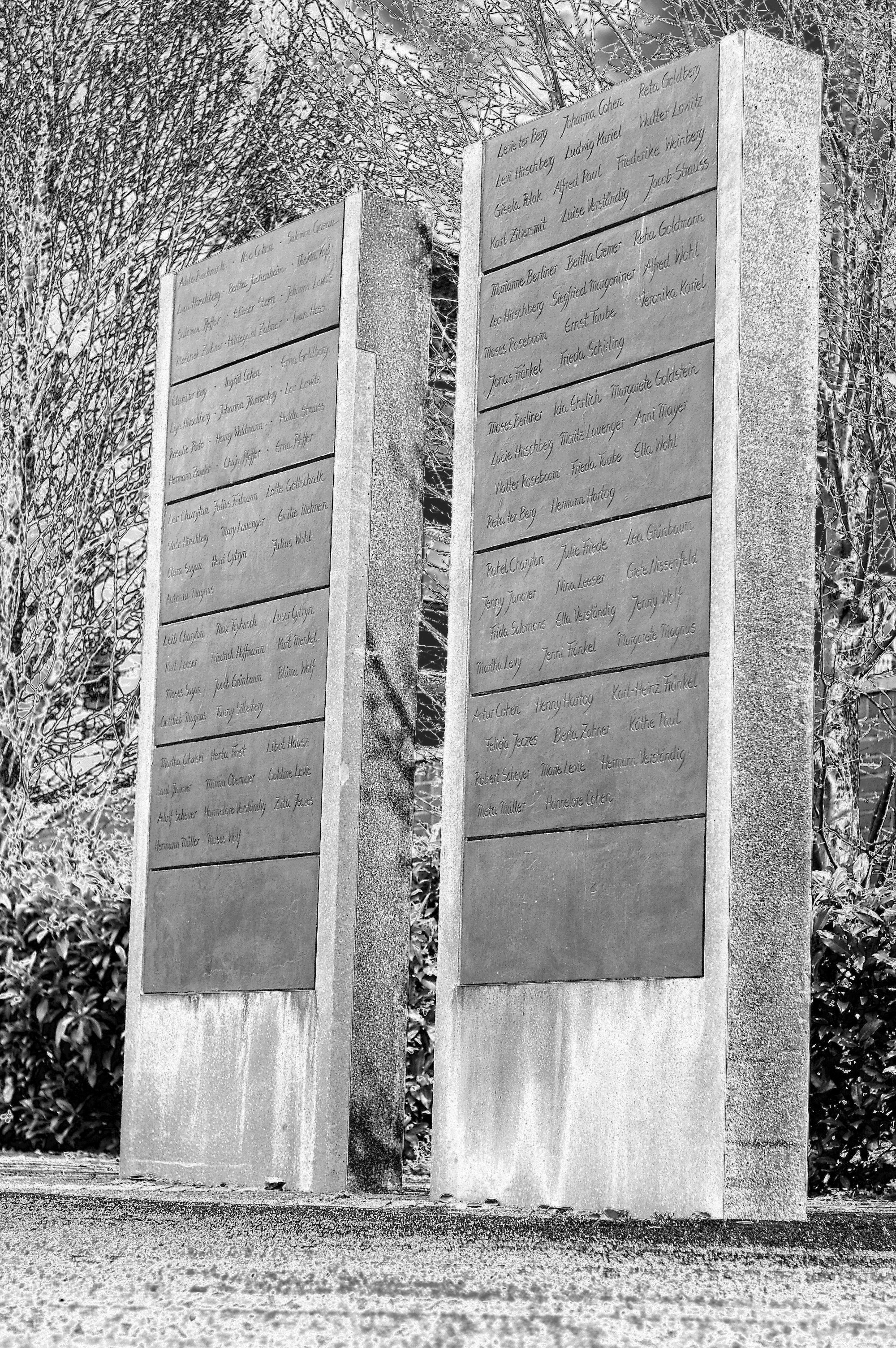 Wilhelmshaven Synagogenplatz tafeln, Denkmal für aus Wilhelmshaven verschwundene Juden Skulptur, Plastik, Bildhauerei, Installation , Bronze, Relief Denkmal Wilhelmshaven, Niedersachsen, Deutschland